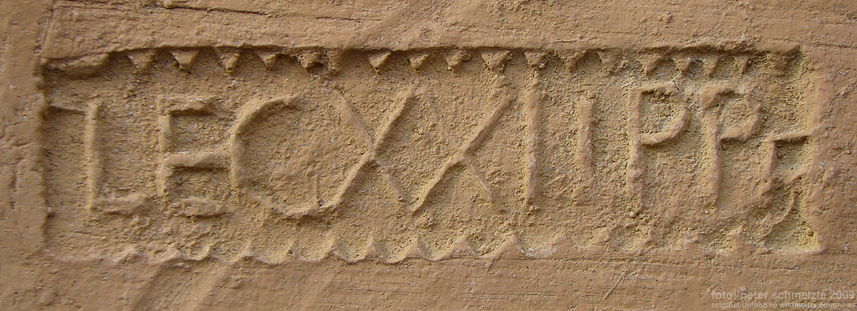 Abguss eines in Jagsthasuen gefundenen Legionsstempels im Römerbad Jagsthausen.